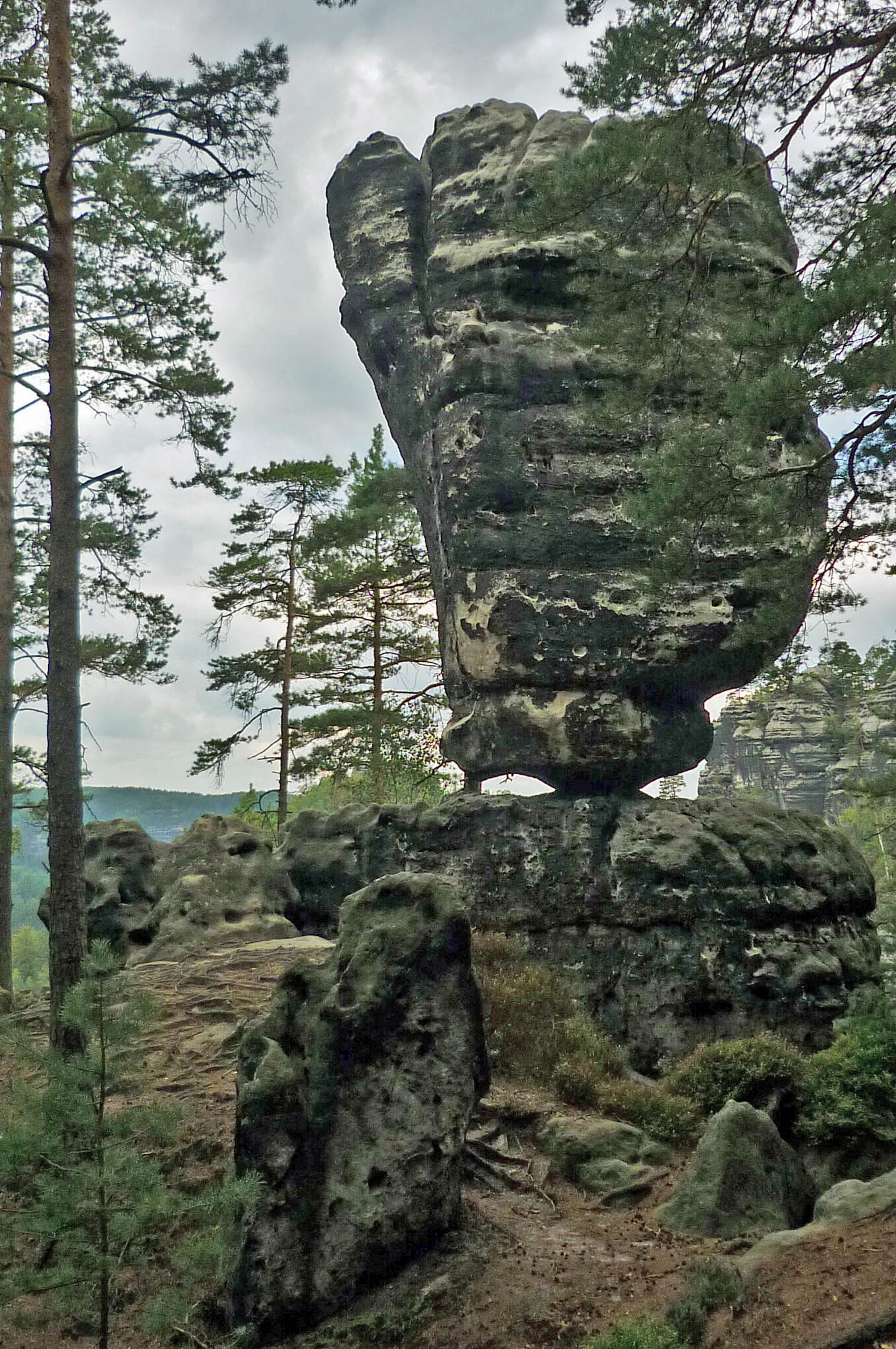 Hickelkopf in der Sächsischen Schweiz